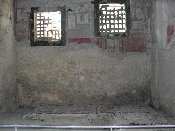 Casa dell'Alcova (part.) foto di Aldo Ardetti (14 agosto 2007)